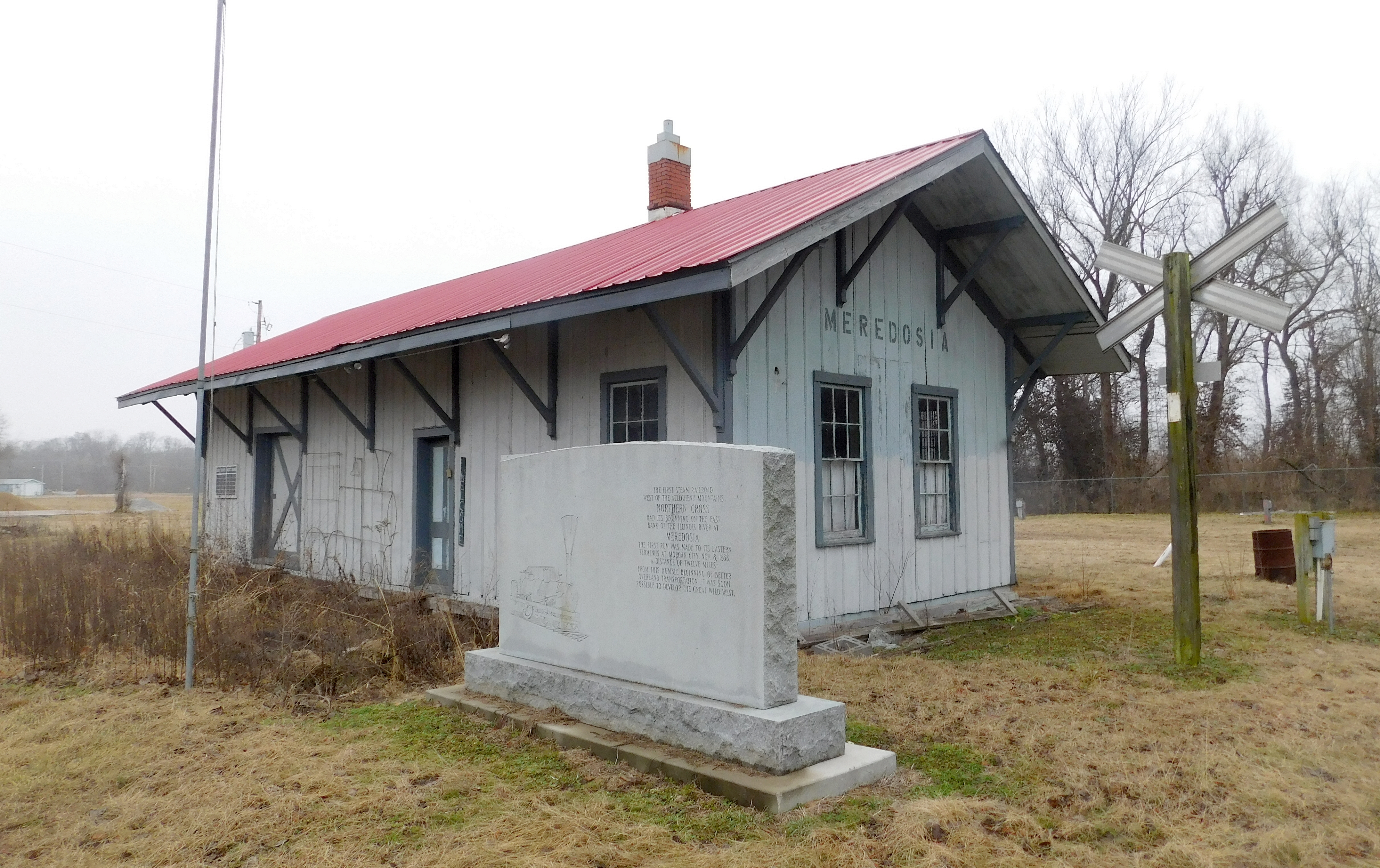 Meredosia Station in Meredosia, Illinois.